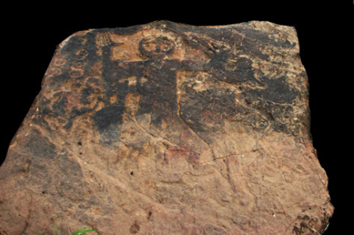 Stèle lybique découverte près de Chemini, de la tribu des Ath Waghlis, datant d'environ 4siècle avant J-C